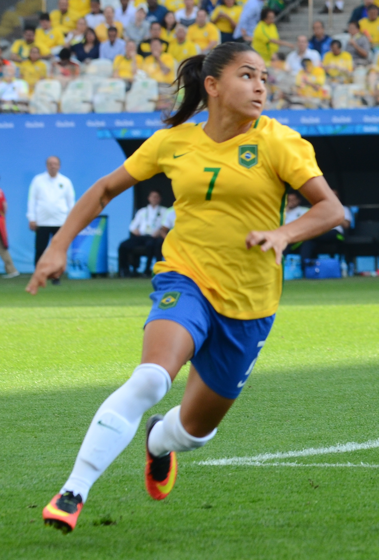 São Paulo - Canadá vence o Brasil por 2 a 1 e fica com a medalha de bronze no futebol feminino dos Jogos Olímpicos, na Arena Corinthians (Rovena Rosa/Agência Brasil)